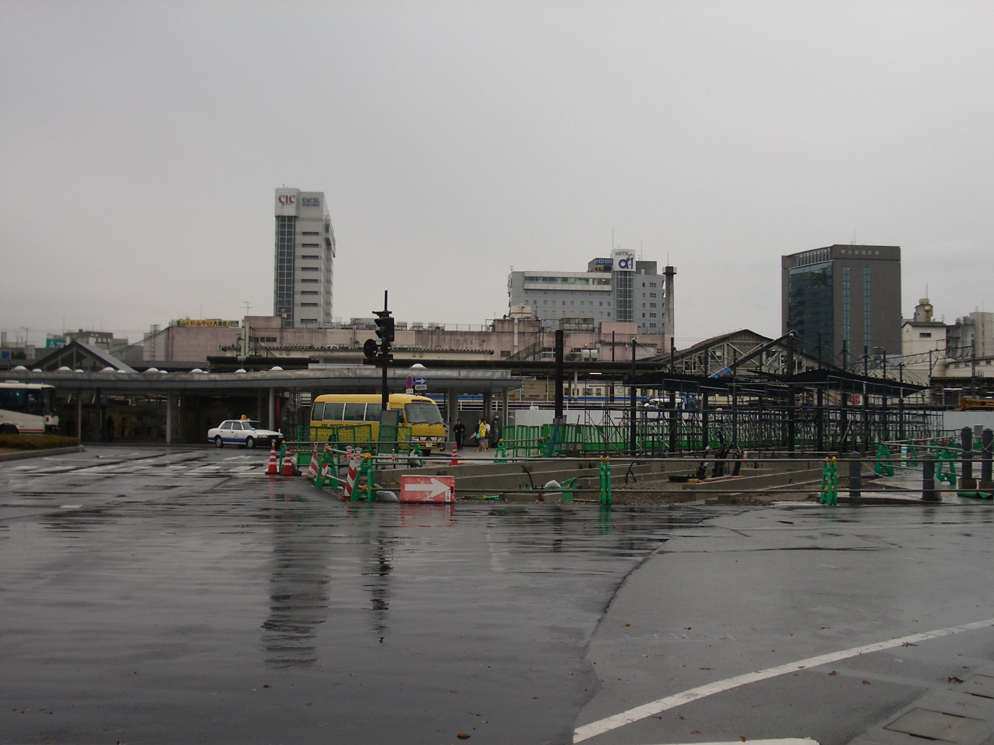 建設中の富山駅北停留場及び旧北口駅舎